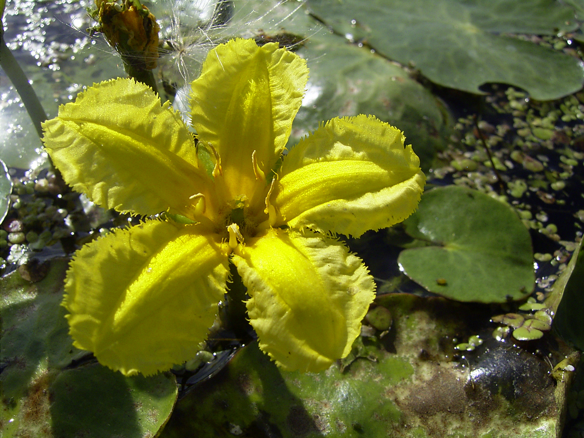 Eigengemaakte foto, Alkmaar, sep 2004, sloot langs rondweg